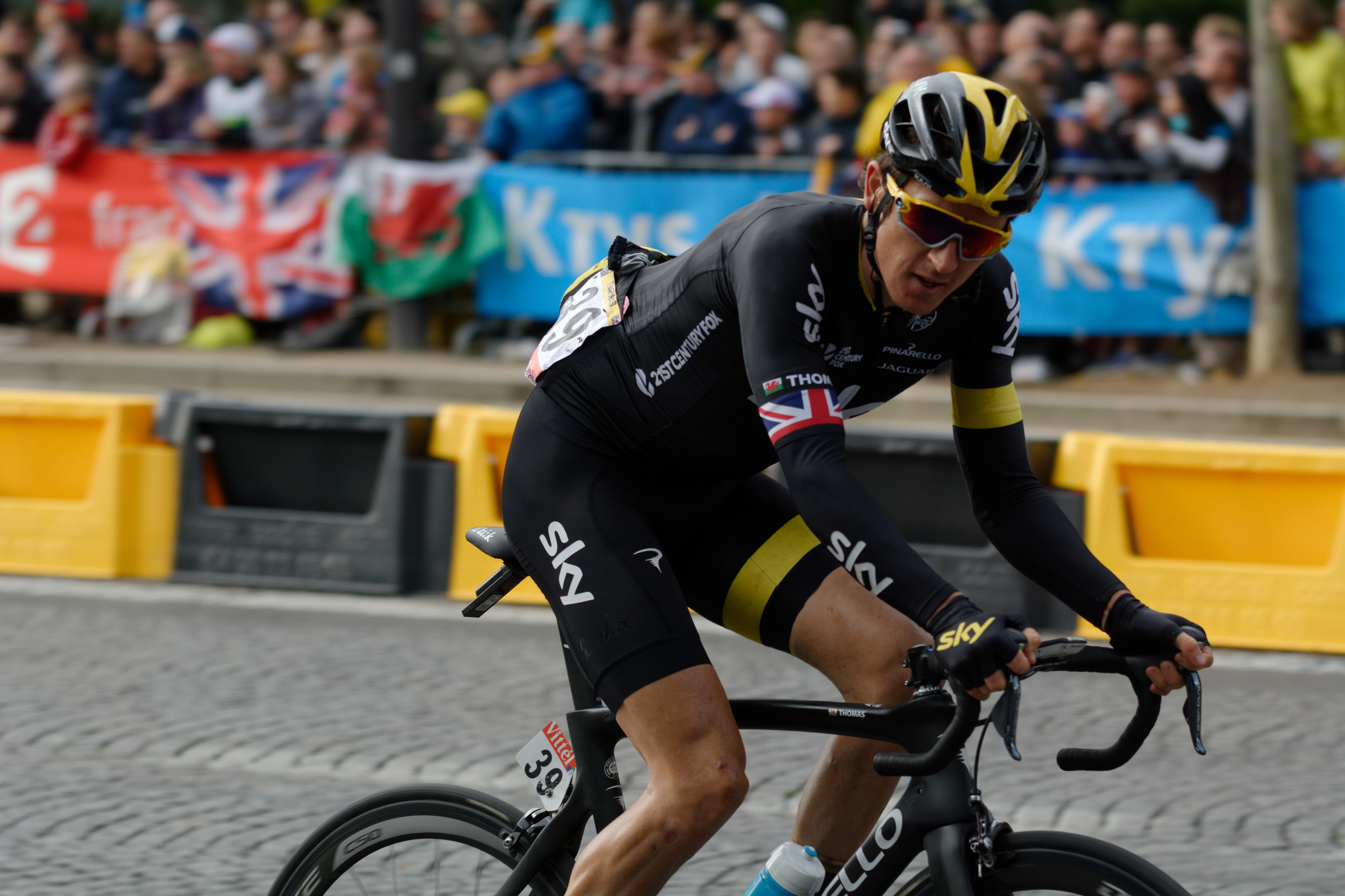 D71_3243_DxO